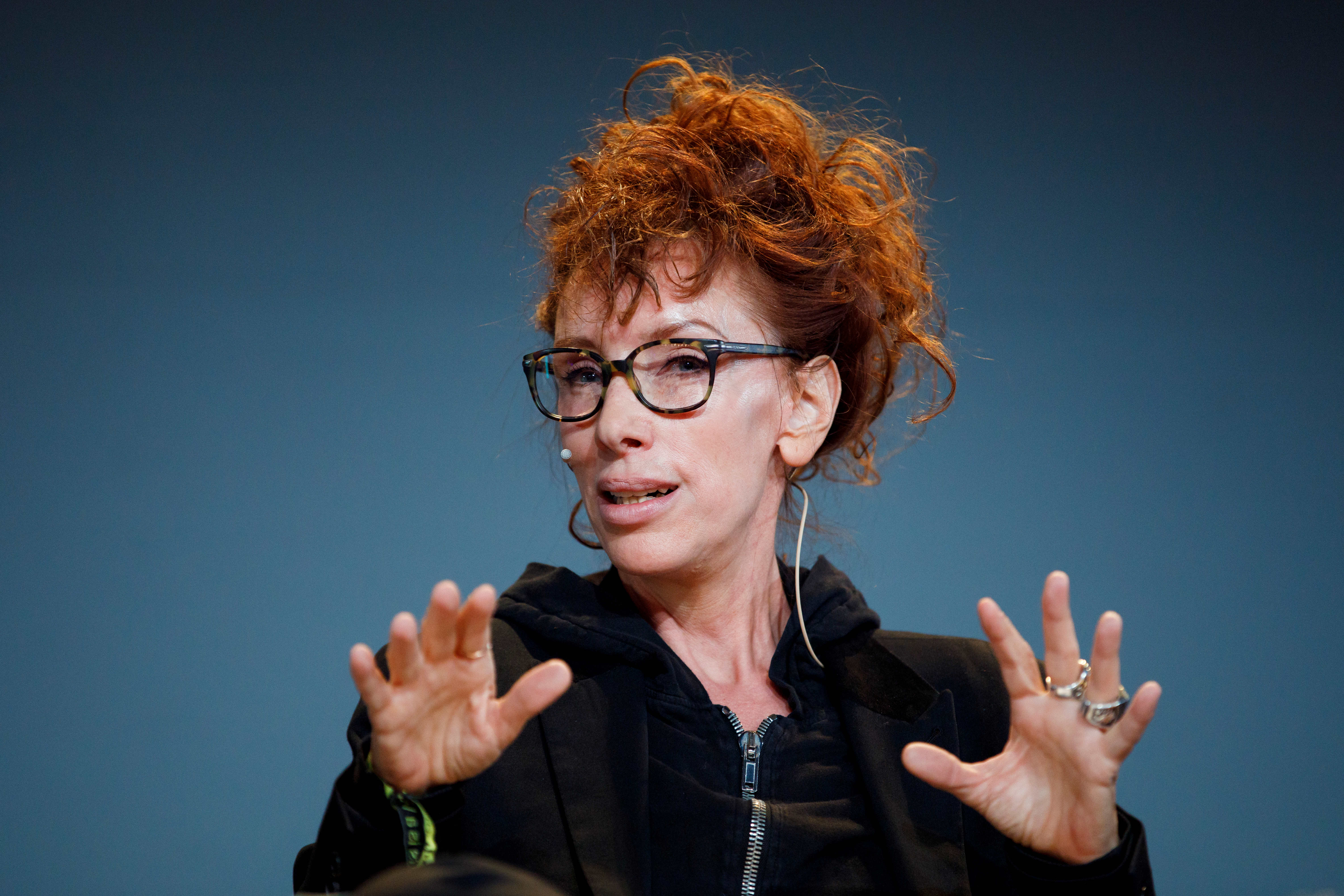 Session: GRM Brainfuck Speaker: Sibylle Berg, Katja Riemann, Nora Al-Badri